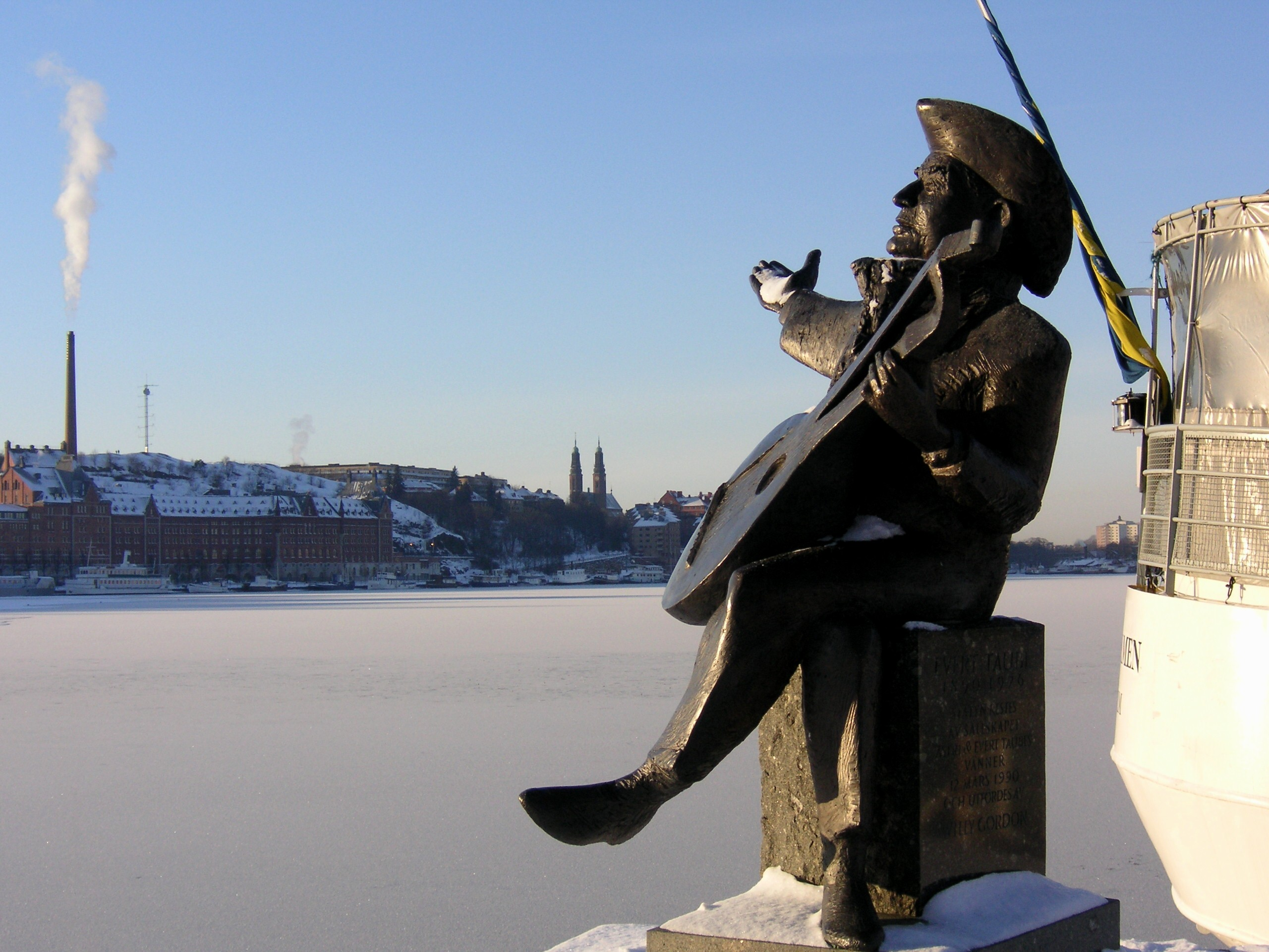 Skulptur av Willy Gordon visande Ewert Taube på Riddarholmen i Stockholm